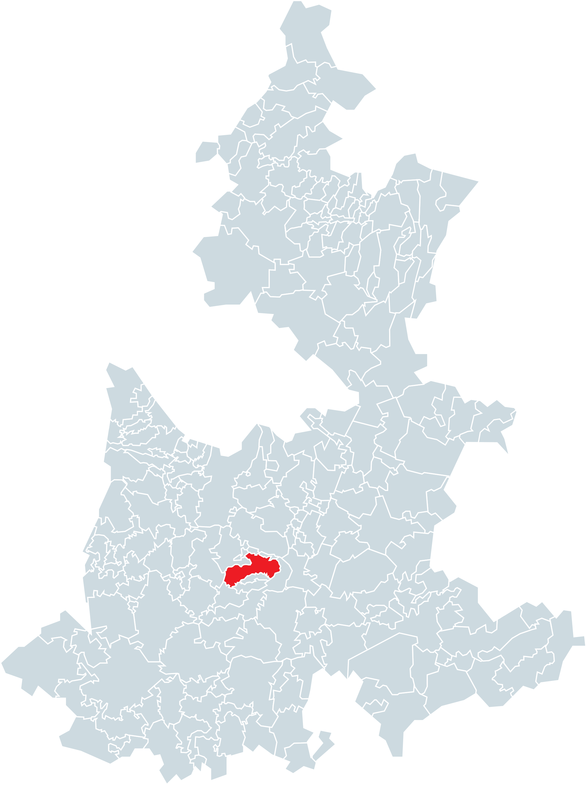 Municipio de Huatlatlauca